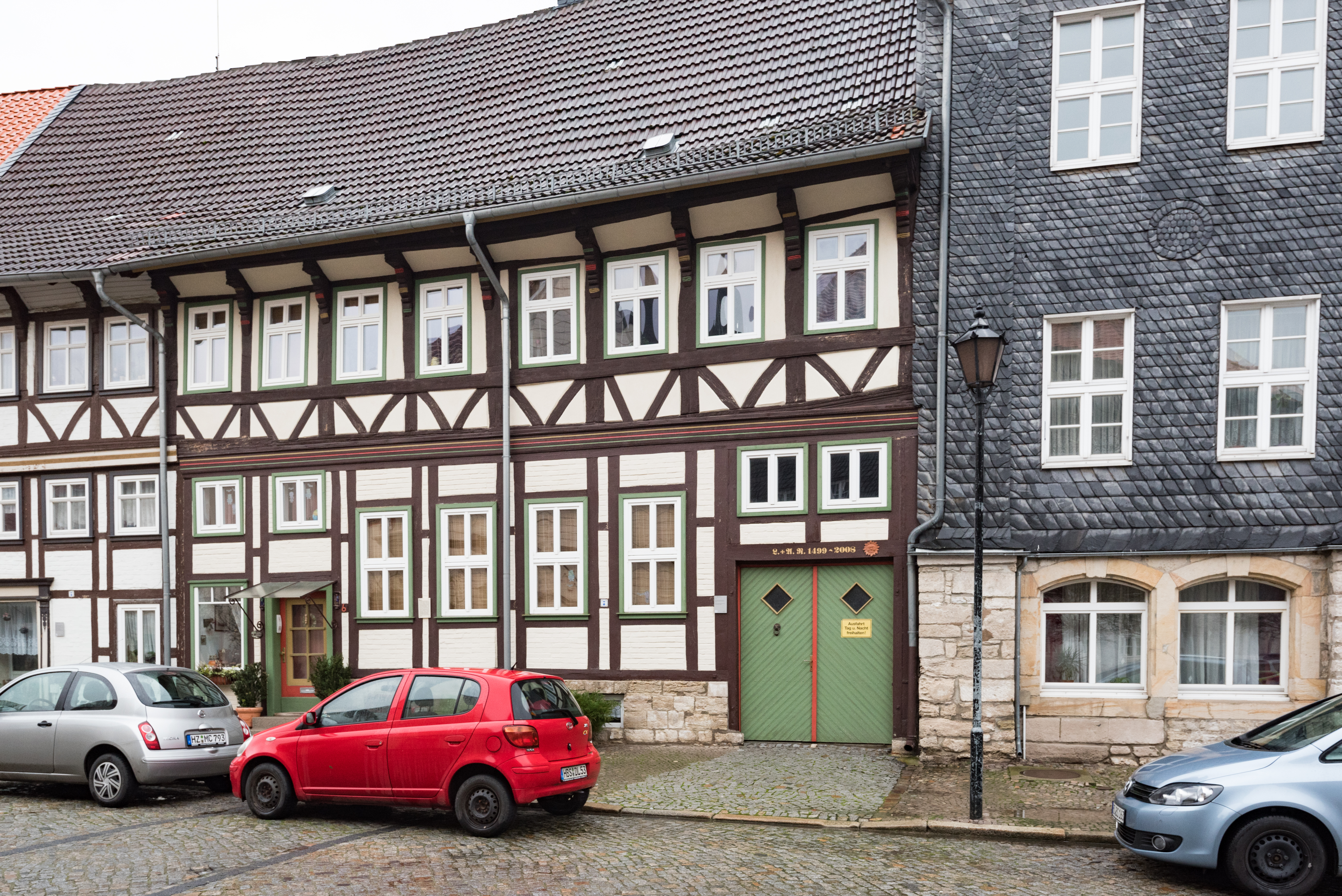 Osterwieck, Am Markt 6